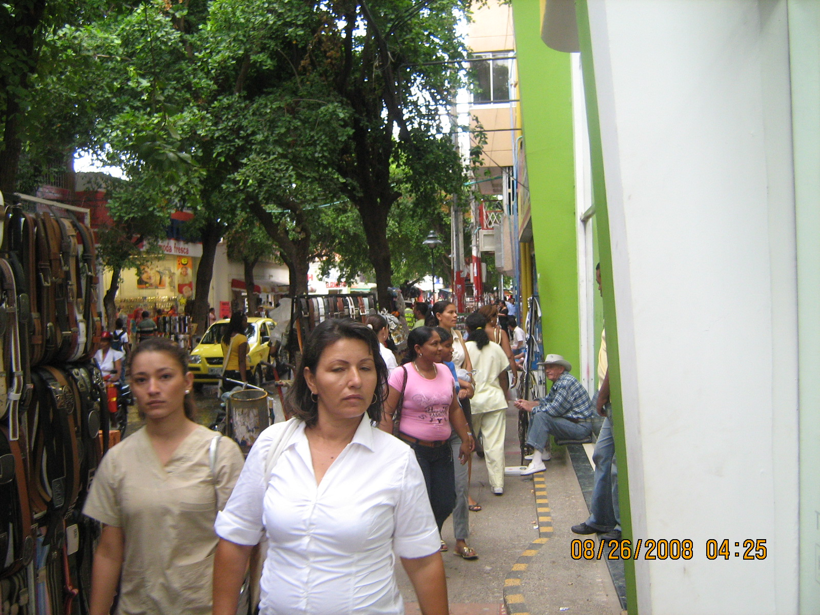 Concurrida calle de Valledupar